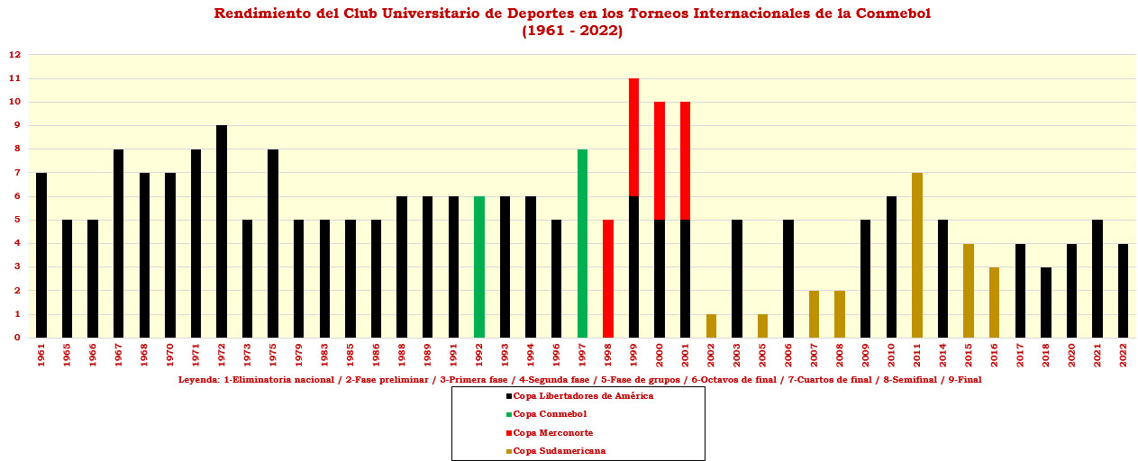 Universitario de Deportes en Competencias Internacionales.